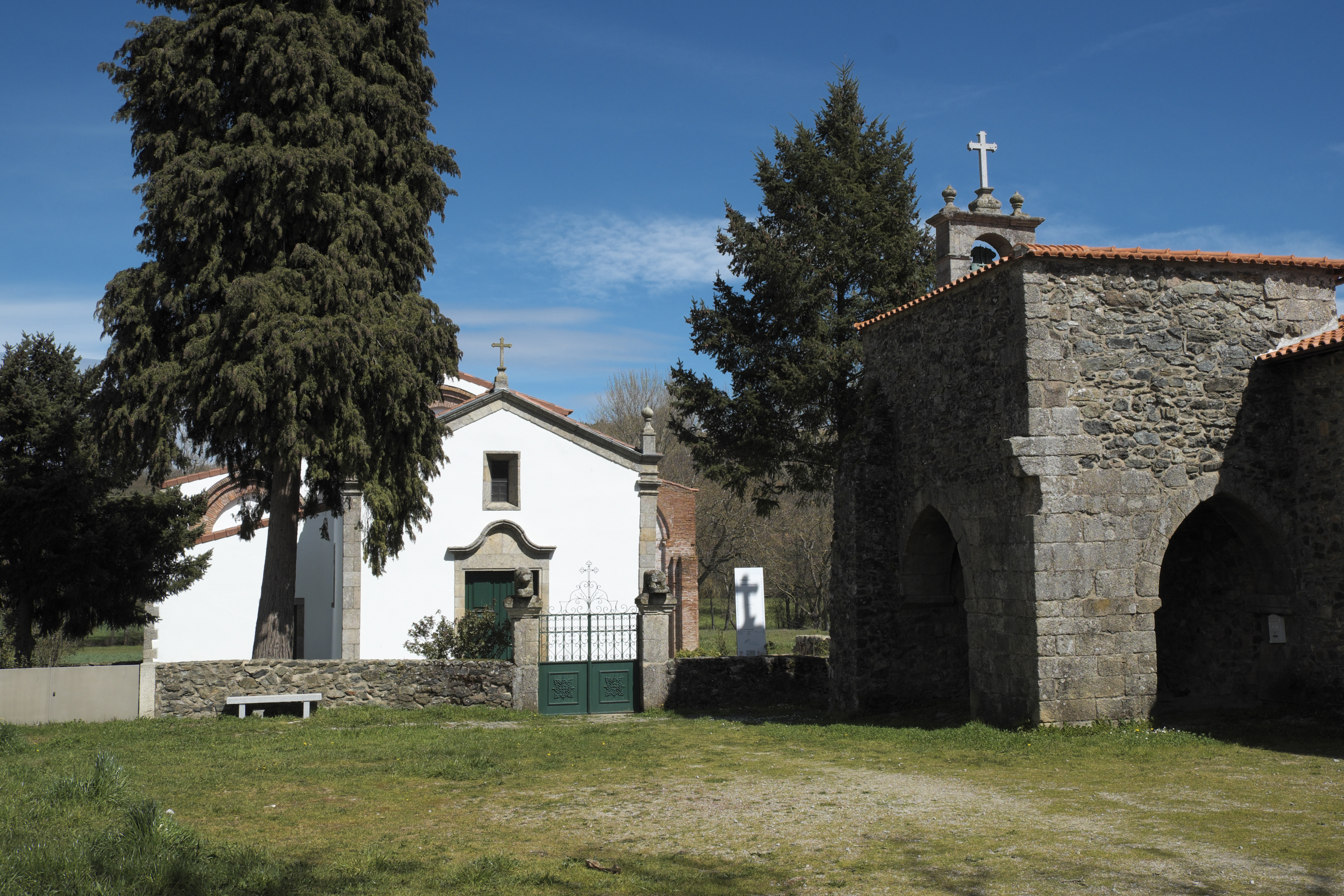 Ehemalige Benediktinerabteikirche in Castro de Avelãs, einer Freguesia von Bragança in der Região Norte (Portugal), Reste des Klosters